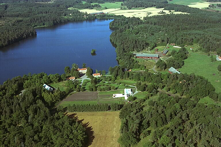 Motiv: Svenneby Nyckelord: Flygbilder, Riksintressen Kategori: Herrgårds-/slottslandskap Svenneby